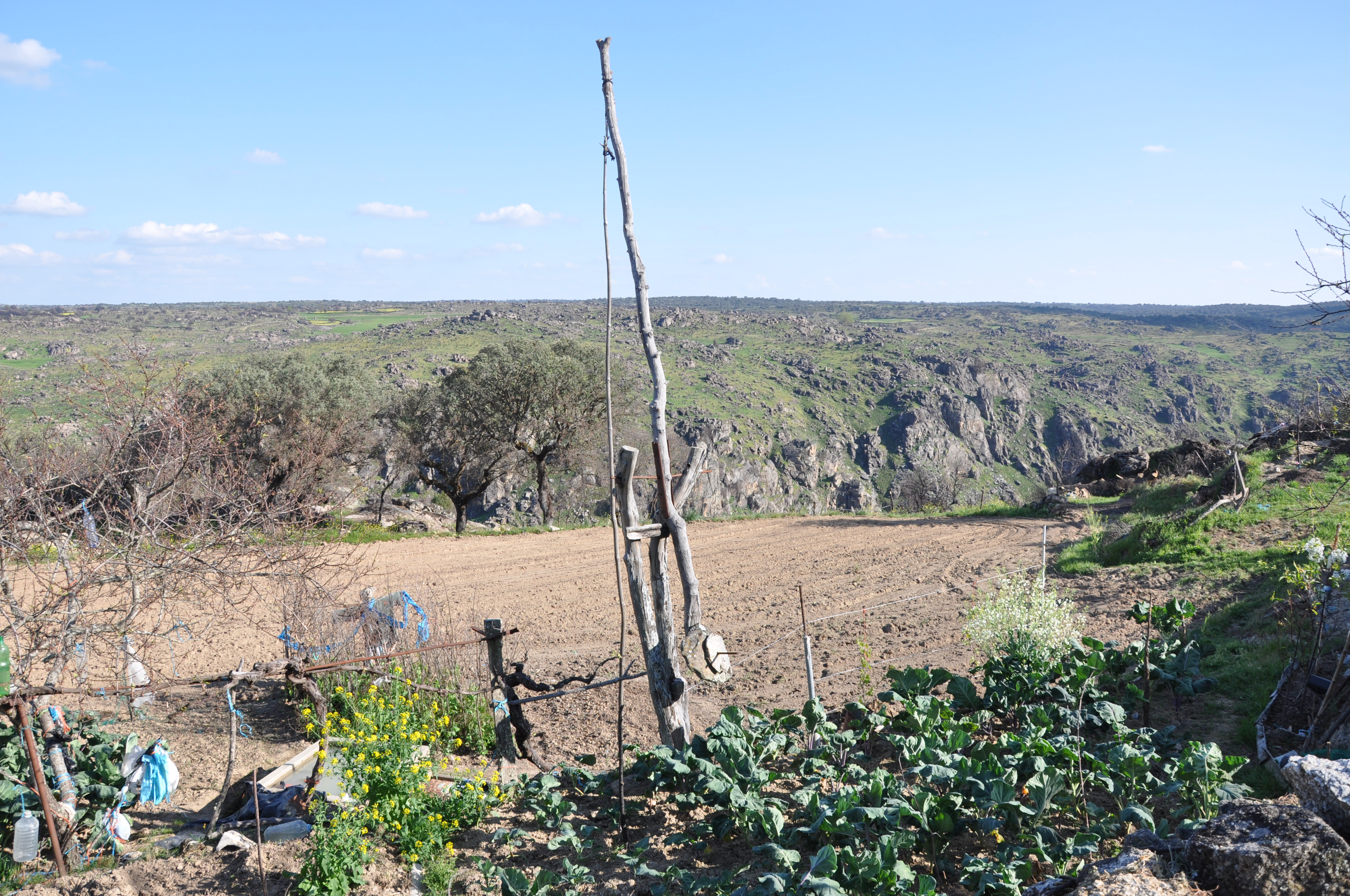 Cigüeñal para sacar agua del pozo, Aldeia Nova, Portugal.